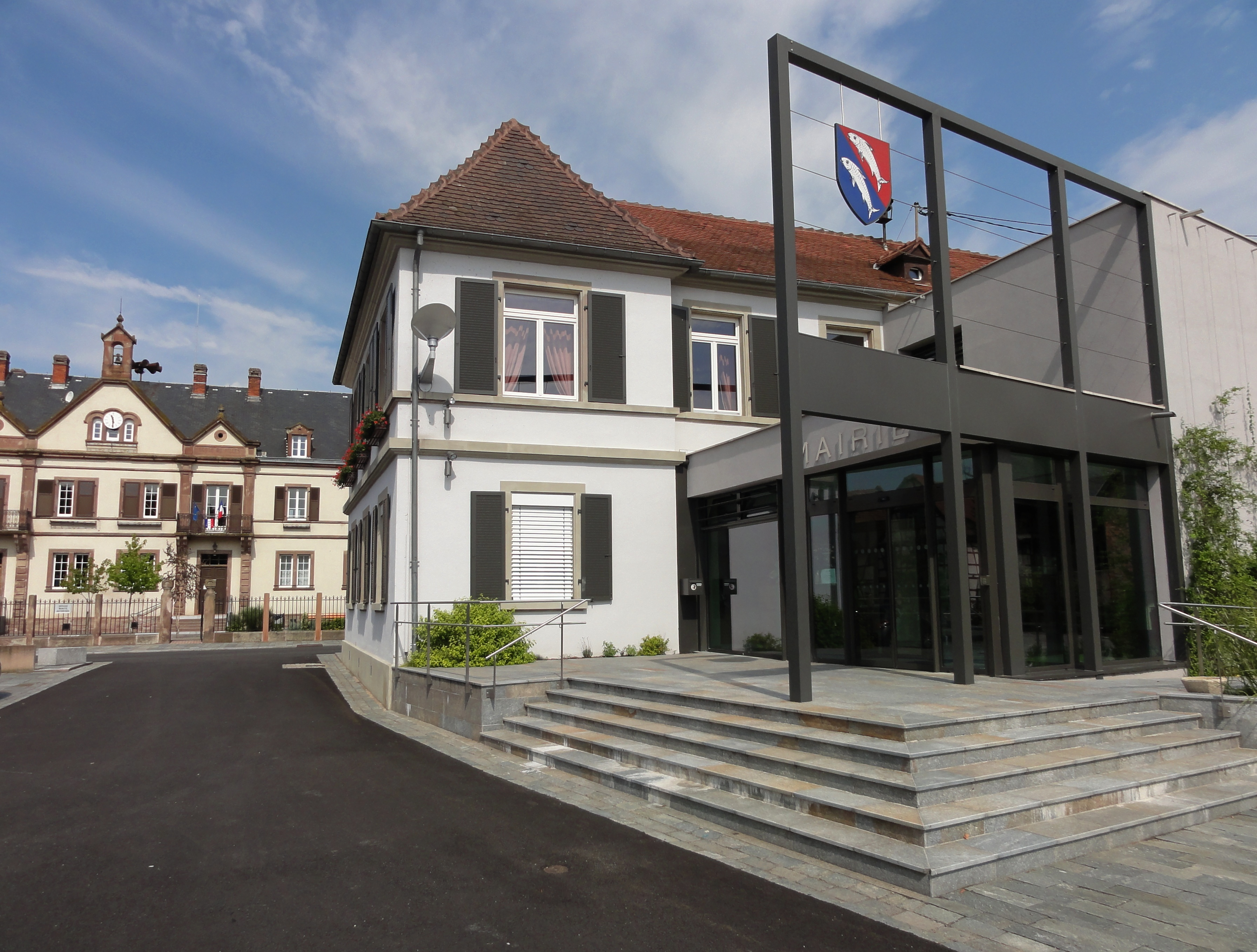 Alsace, Bas-Rhin, Huttenheim, Mairie (1830). .